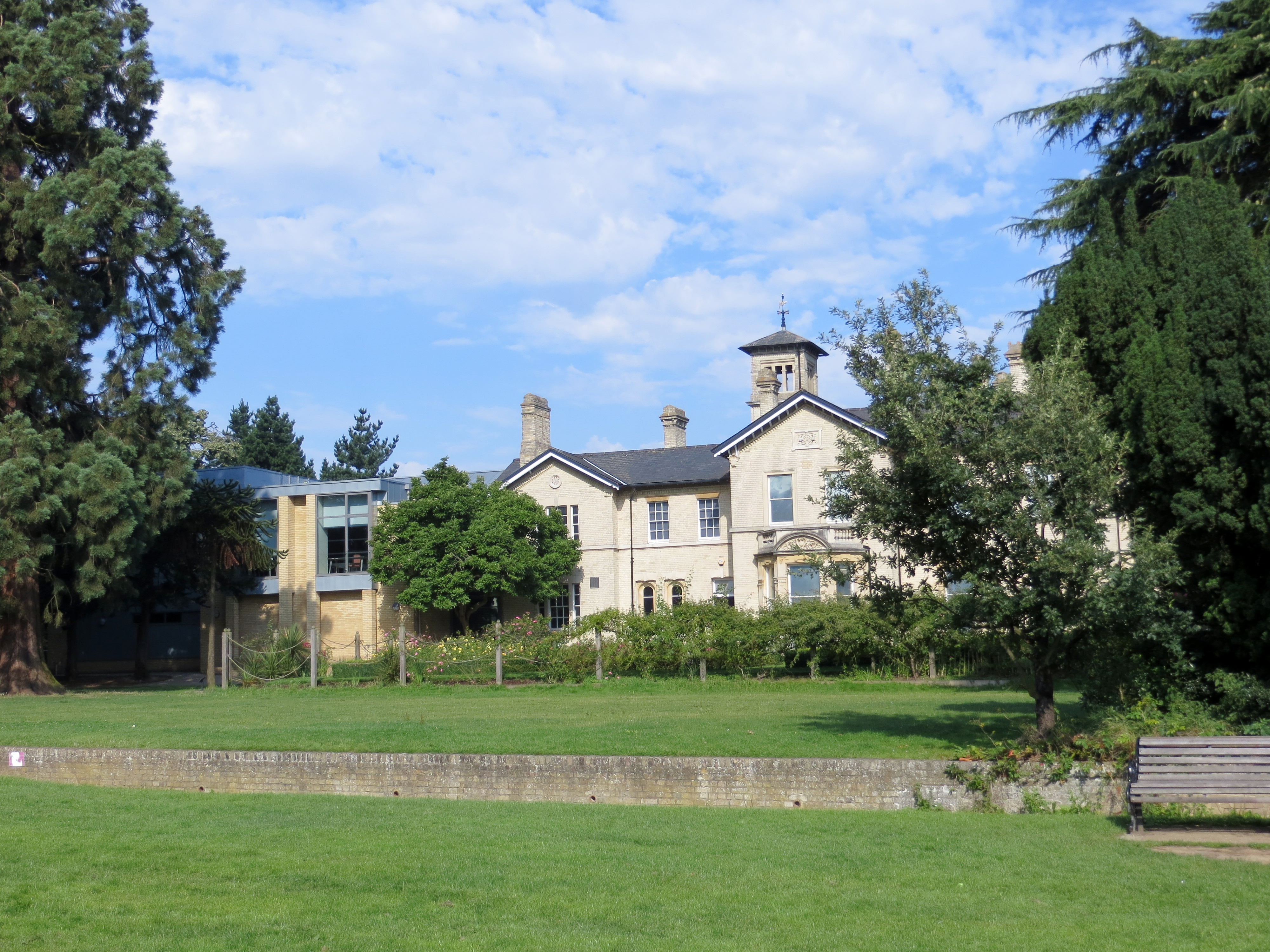 Oaklands House - August 2012